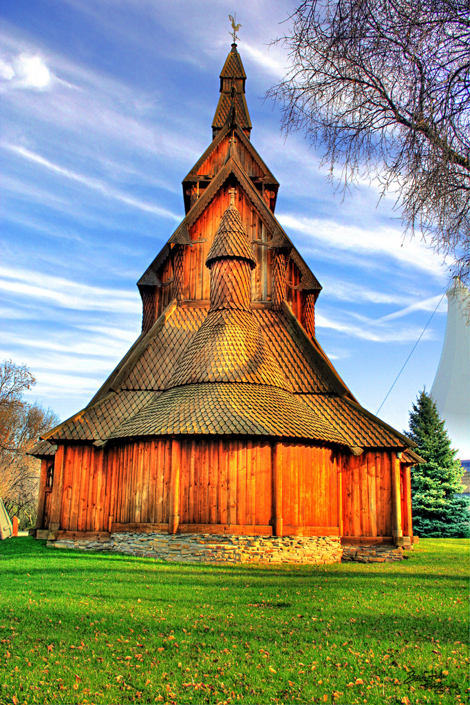 Hopperstad stave church replica på Heritage hjemkomst center i Moorehad, Minnesota, USA